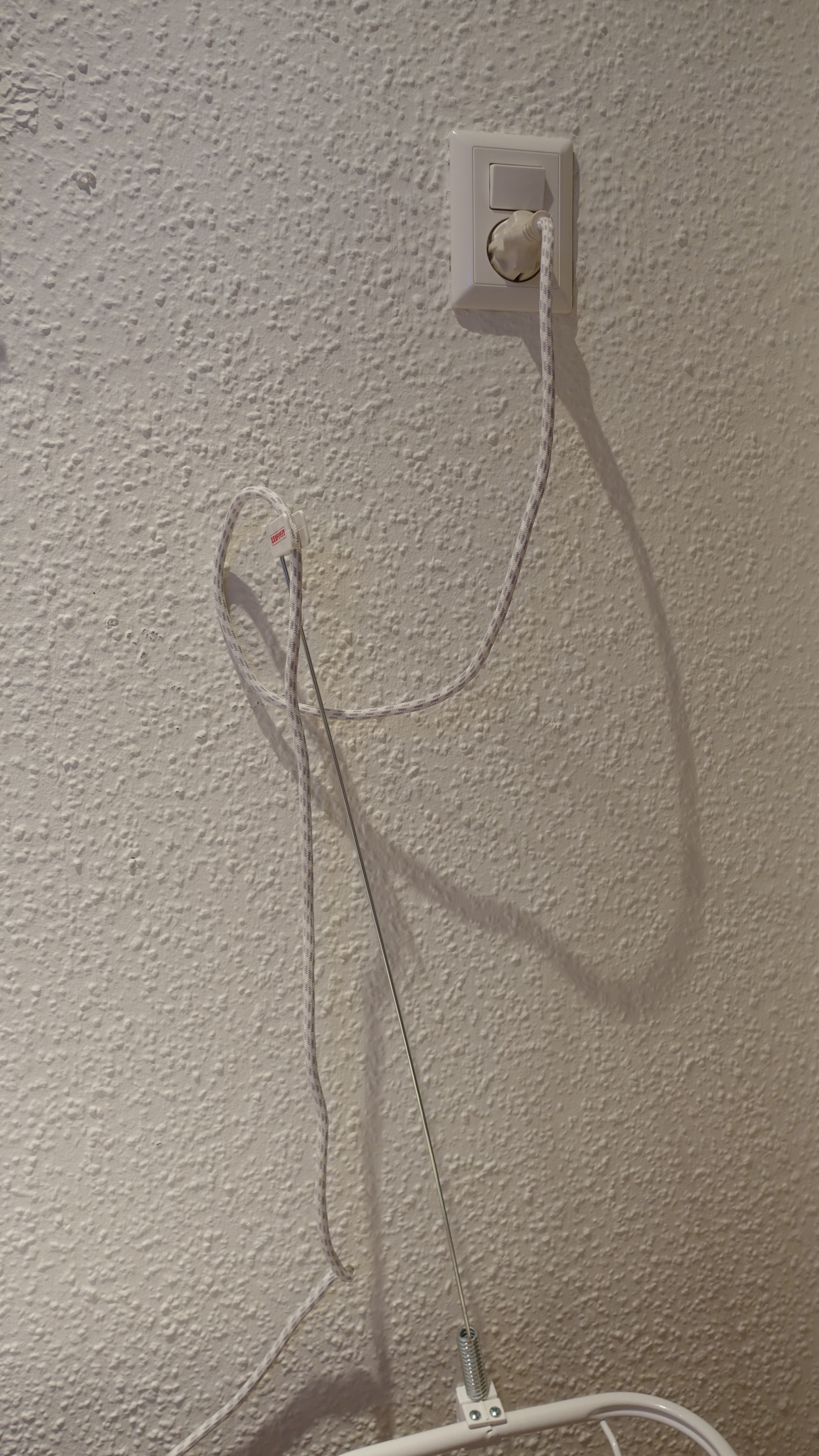 Strijkplank Leifheit in gebruik en diverse onderdelen